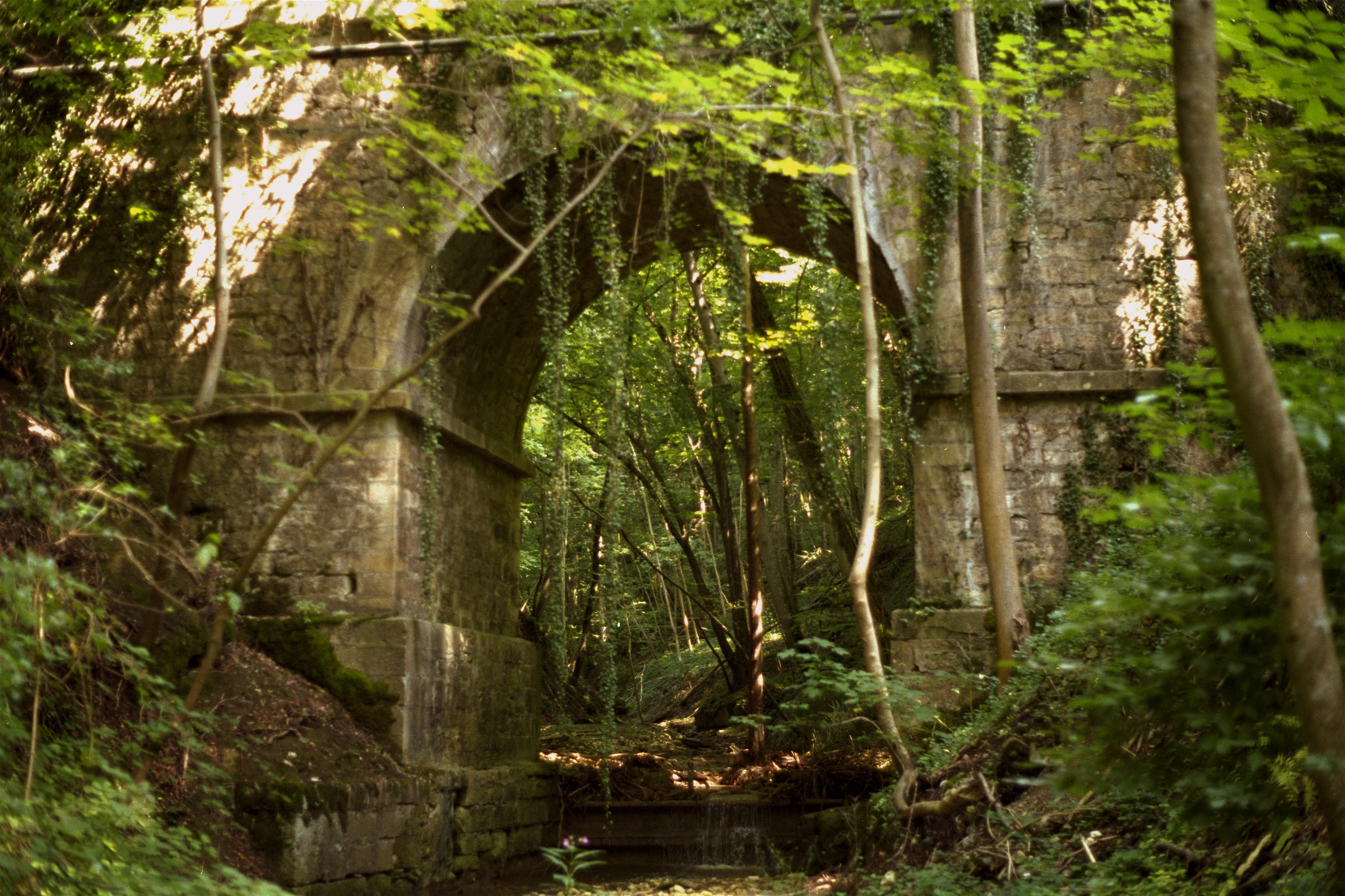 Brücke der alten Rheintalstrasse am nördlichen Hochrhein im Klettgau beim Gehöft Guggenmühle, nahe der Burgruine Weisswasserstelz bei Hohentengen, Landkreis Waldshut, Baden-Wurttemberg.